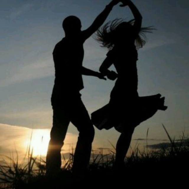 Chamame añamemby